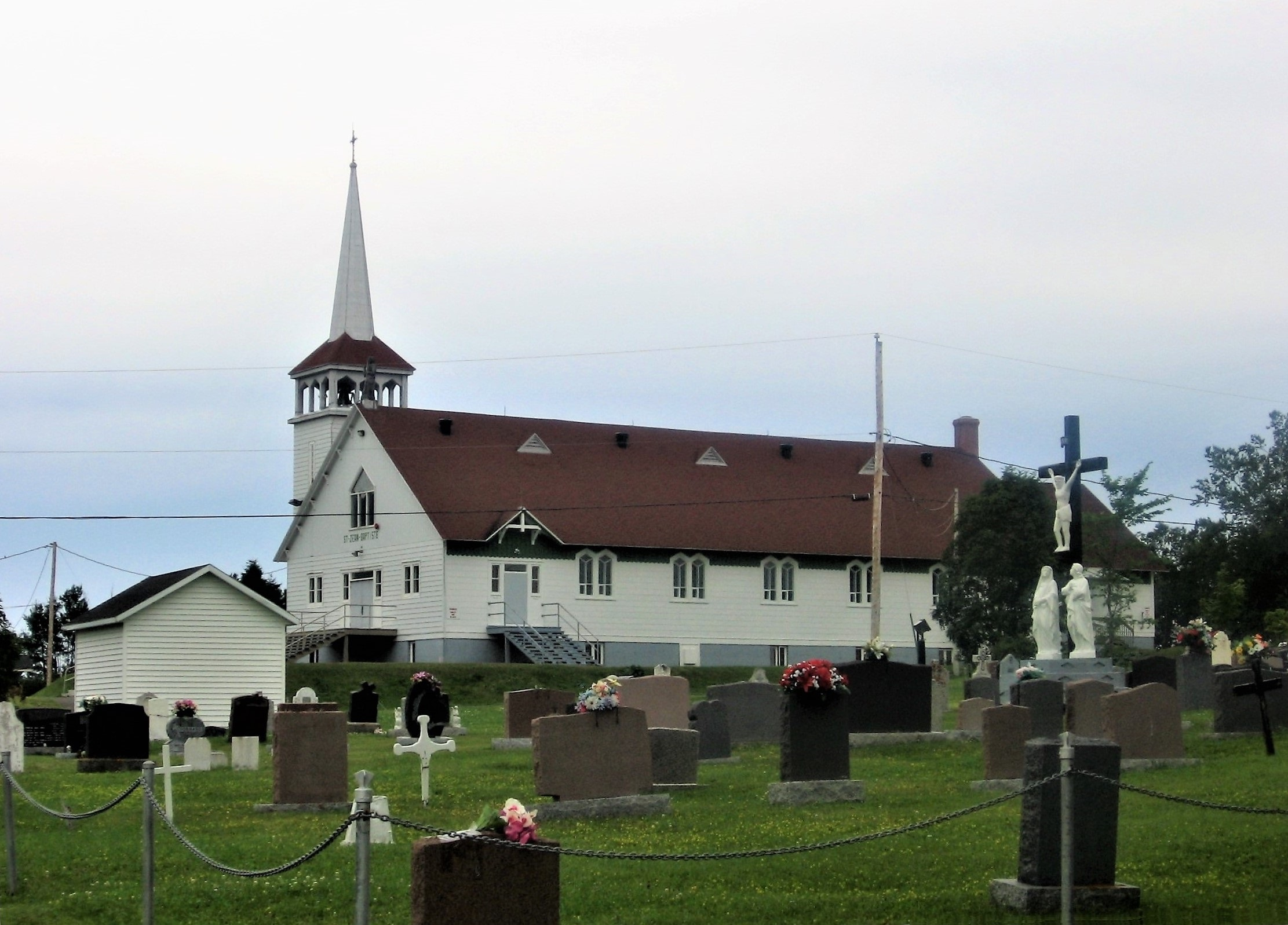 Église catholique Saint-Jean-Baptiste, Cap-aux-Os, Gaspé, Québec L'église a été construite en 1951-1952, selon les plans de l'architecte René Blanchet.